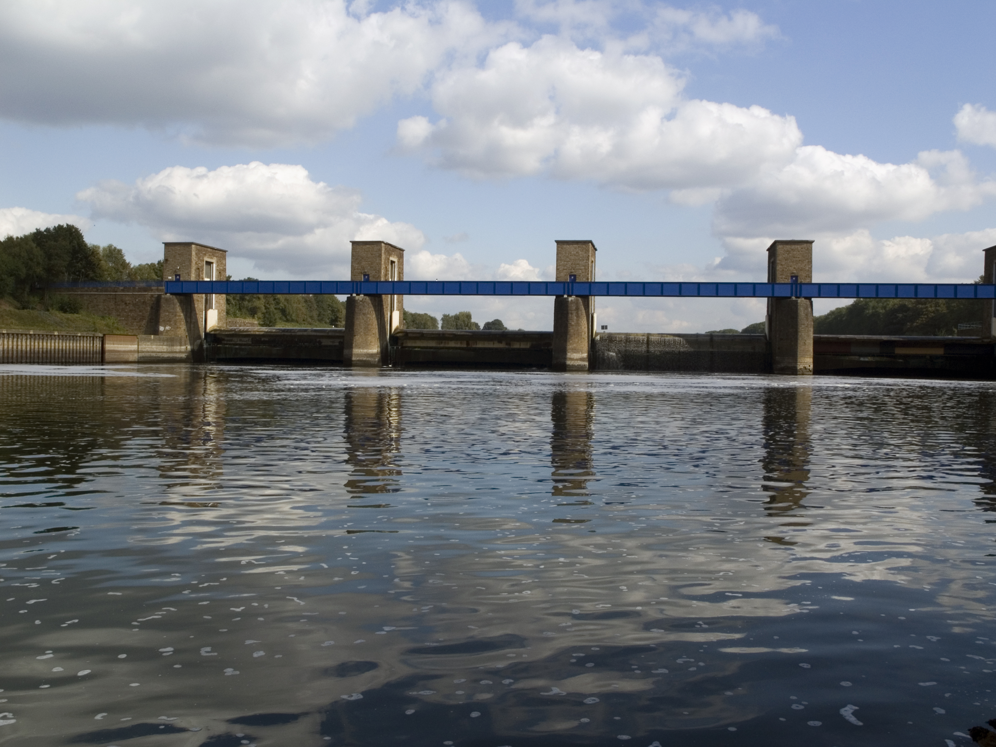 Nordrhein-Westfalen, Duisburg – Ruhrschleuse